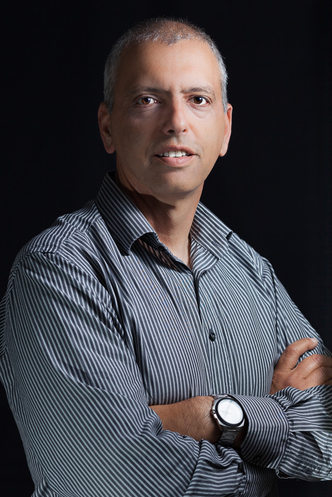 Haim Ravia